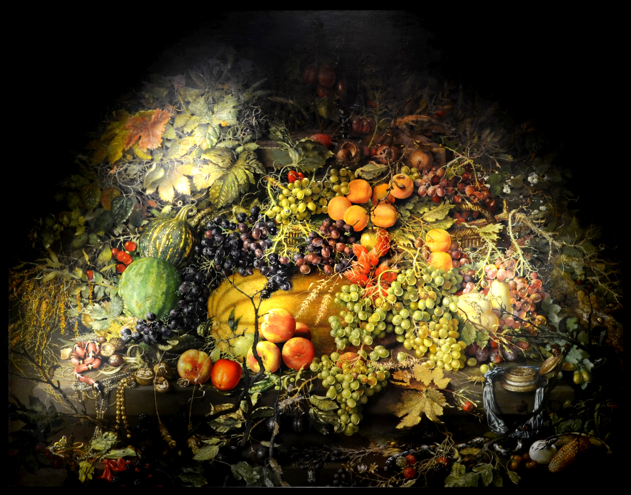 Bedřich Dlouhý, Zkouška podkladu (2003-2004), olej na plátně